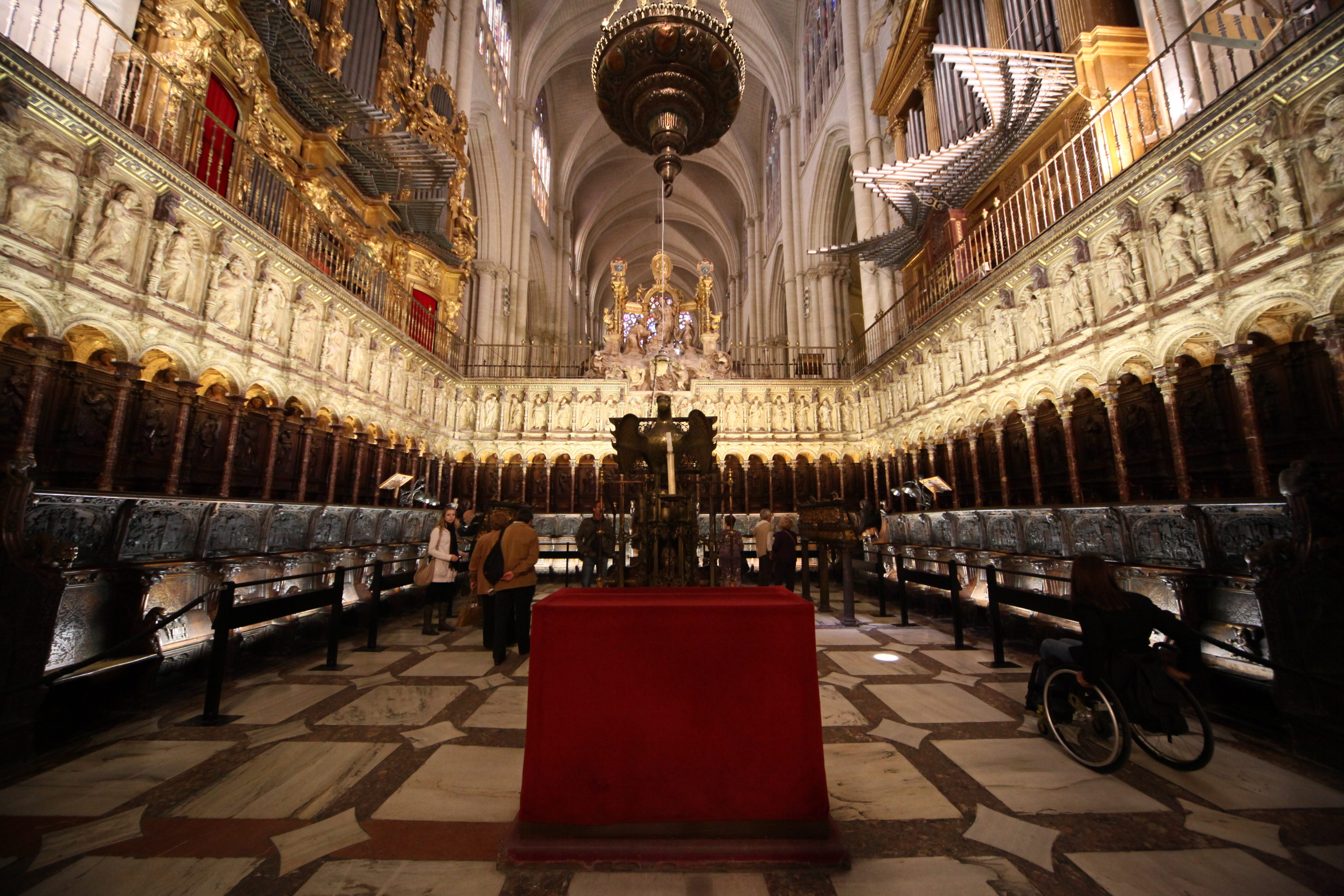 Vista general del coro de la Catedral de Toledo